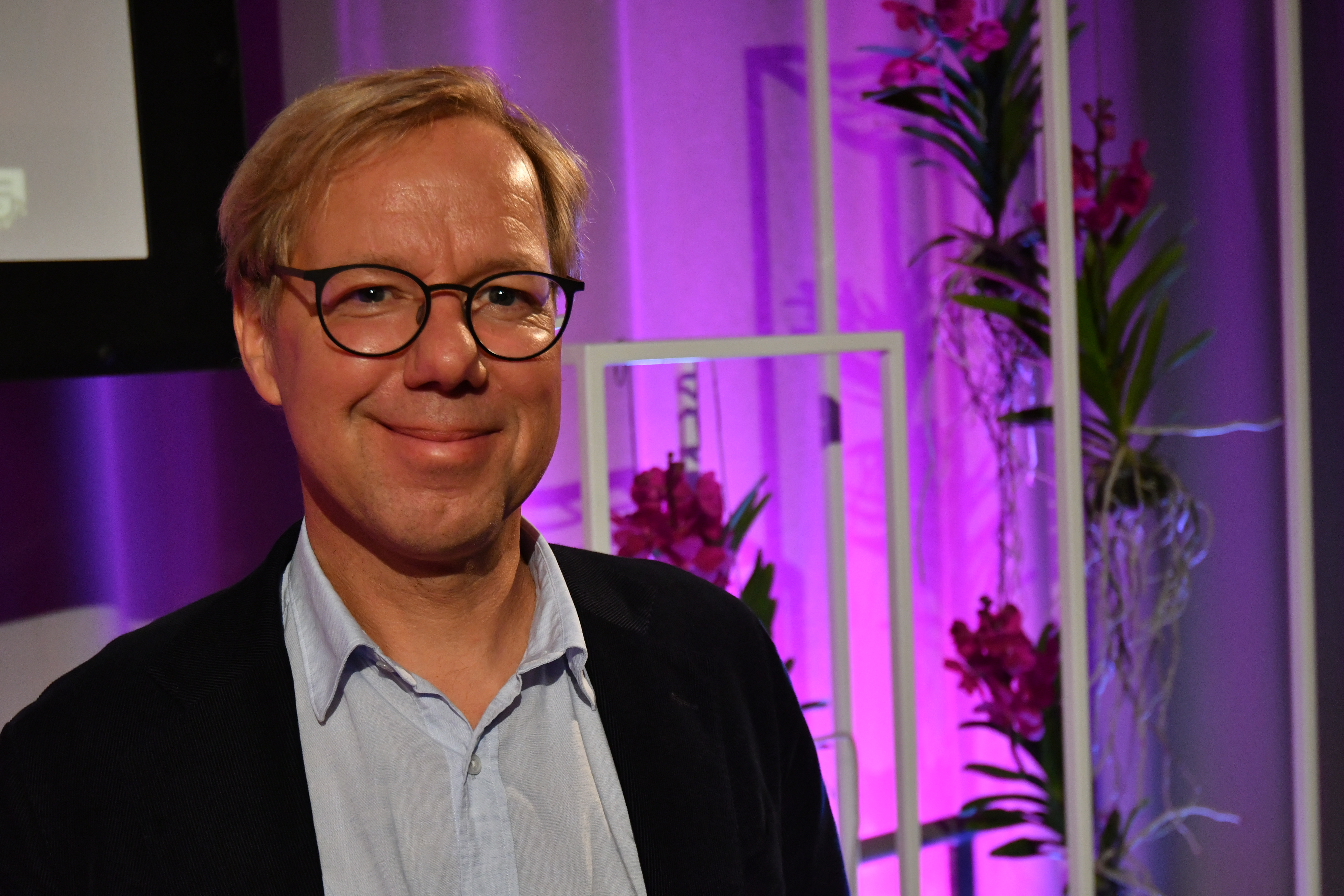 Patrik Hadenius efter ett seminarium på Bokmässan den 27 september 2018.